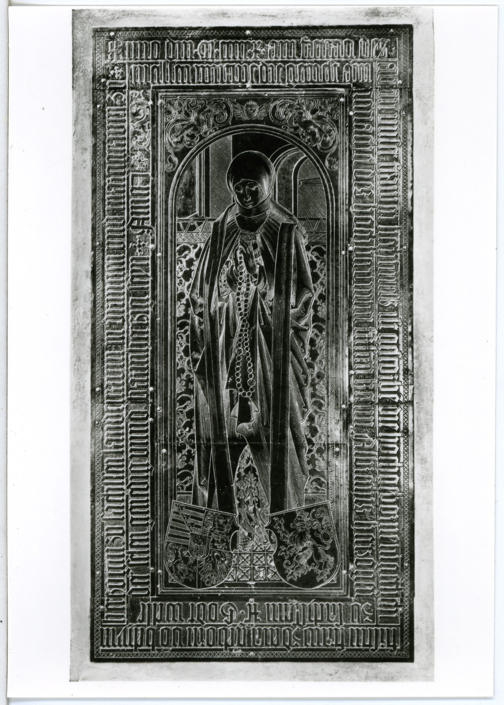 Meißen; Dom - Grabplatte Herzogin Zedena, Fürstenkapelle This postcard is from publisher Brück & Sohn in Meißen ( postcard has a unique number 30163 and is available in a higher resolution at the publisher. This images was uploaded in a cooperation project between Wikipedians and the publisher.